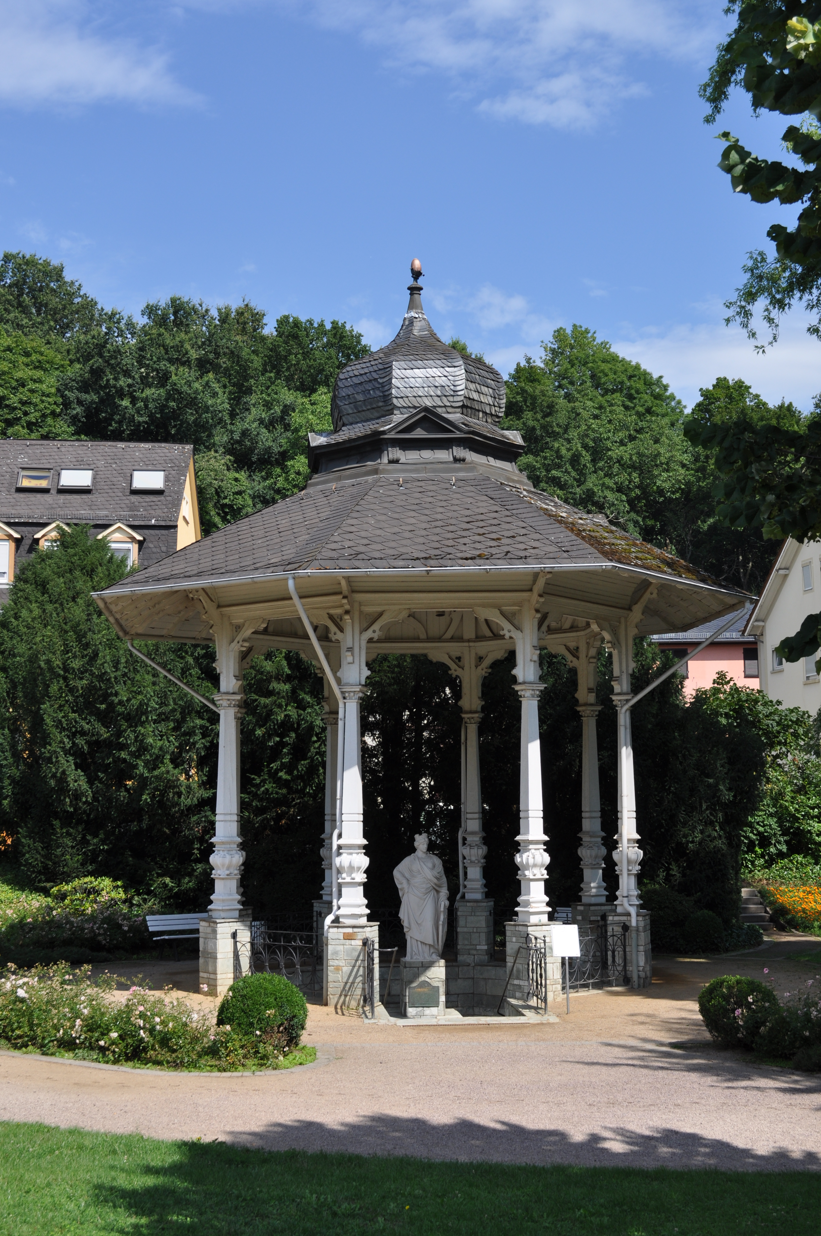 Solbrunnen im Quellenpark in Bad Soden. Es handelt sich um eine fluorid- und kohlensäurehaltige Natrium-Chlorid-Therme. 1567 wurde die Quelle vom Rat der Stadt Frankfurt geprüft und zur Salzgewinnung freigegeben. Ab 1854 war die Quelle als Kur- und Trinkbrunnen in Benutzung. 1856 erfolgte eine Neufassung mit einer Bohrung auf 6 Meter Tiefe. 1886 wurde der "Sodenia-Pavillion" über der Quelle errichtet.